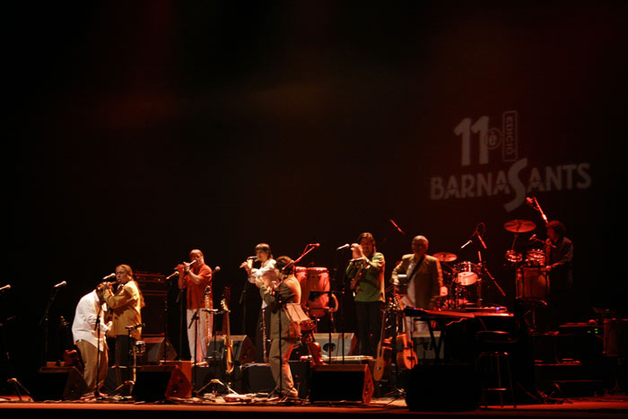 Barcelona marzo 2006